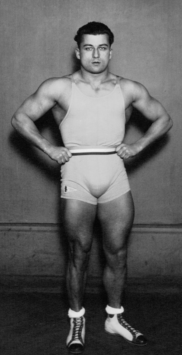 Le Put Gaston, haltérophile, champion de France (portrait à 3 m en pied) : [photographie de presse] / Agence Meurisse